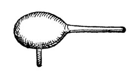 Vase pour séparer l'huile de l'eau, d'après Della Porta, Distillations